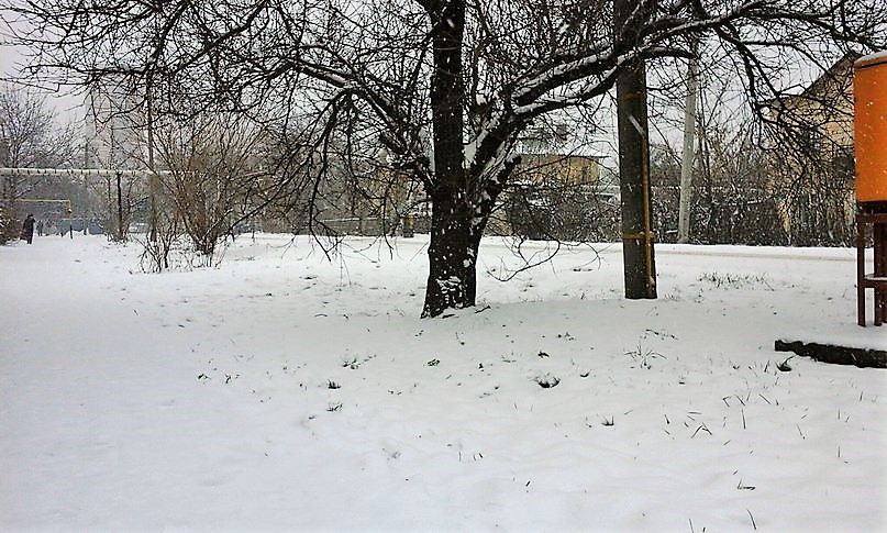 Снег в Краснодаре 30 декабря 2015 года.